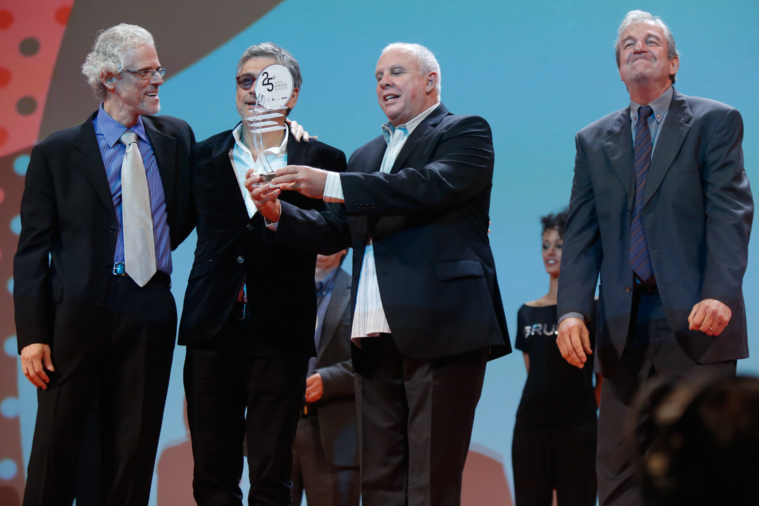 Categoria MPB - Grupo: Boca Livre durante o 25º Premio da Musica Brasileira no Theatro Municipal. Foto: Roberto Filho (14/05/14)